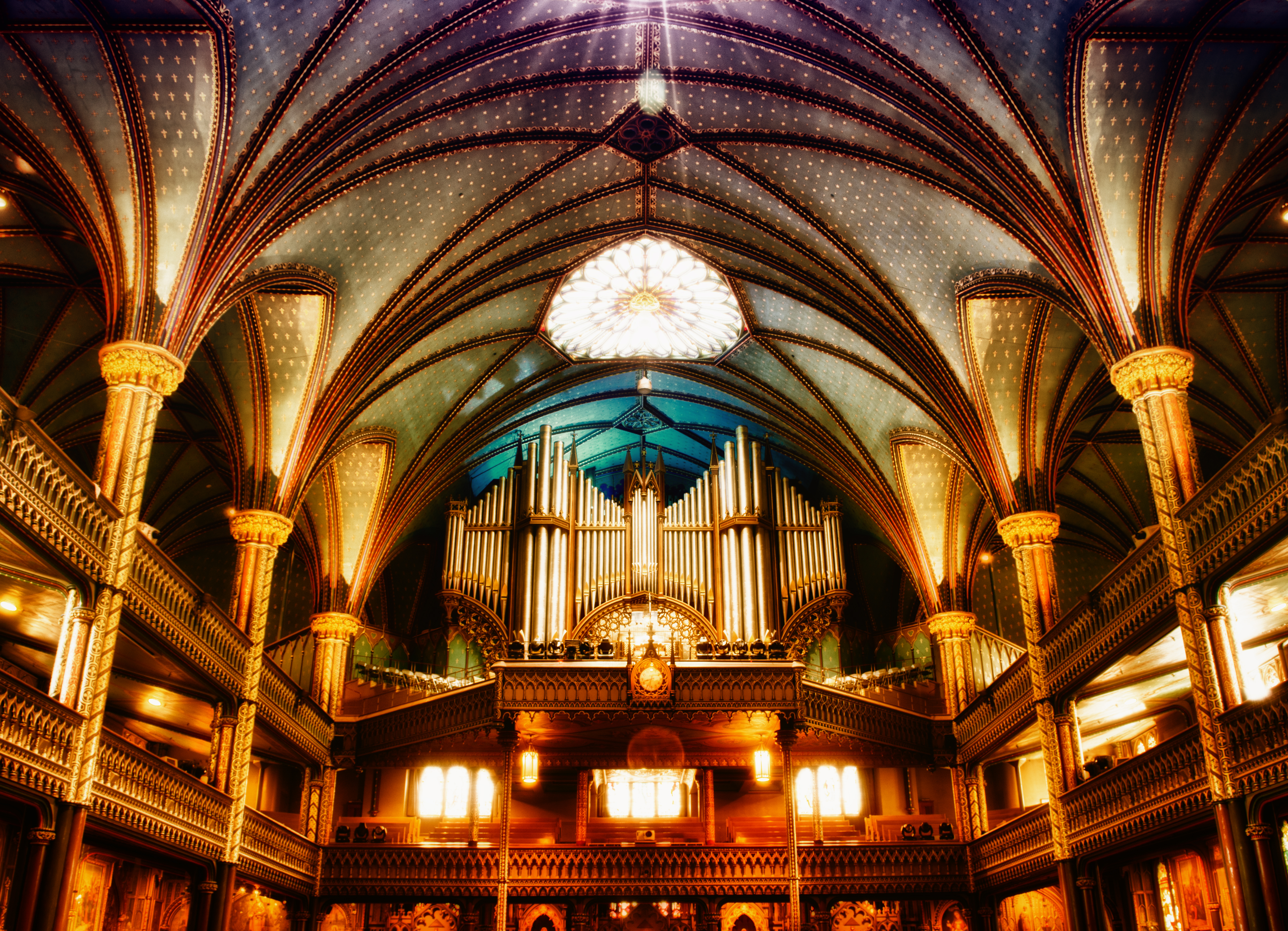 Cette photo présente au niveau personnel le rayon de l’espoir, cette prise a eu lieu le 7h30 du matin en juillet, pour arriver a cette résultat j ai pris environ 11 photos de différentes exposition pour avoir cette texture profonde et la lumière brillante Technique HDRI.